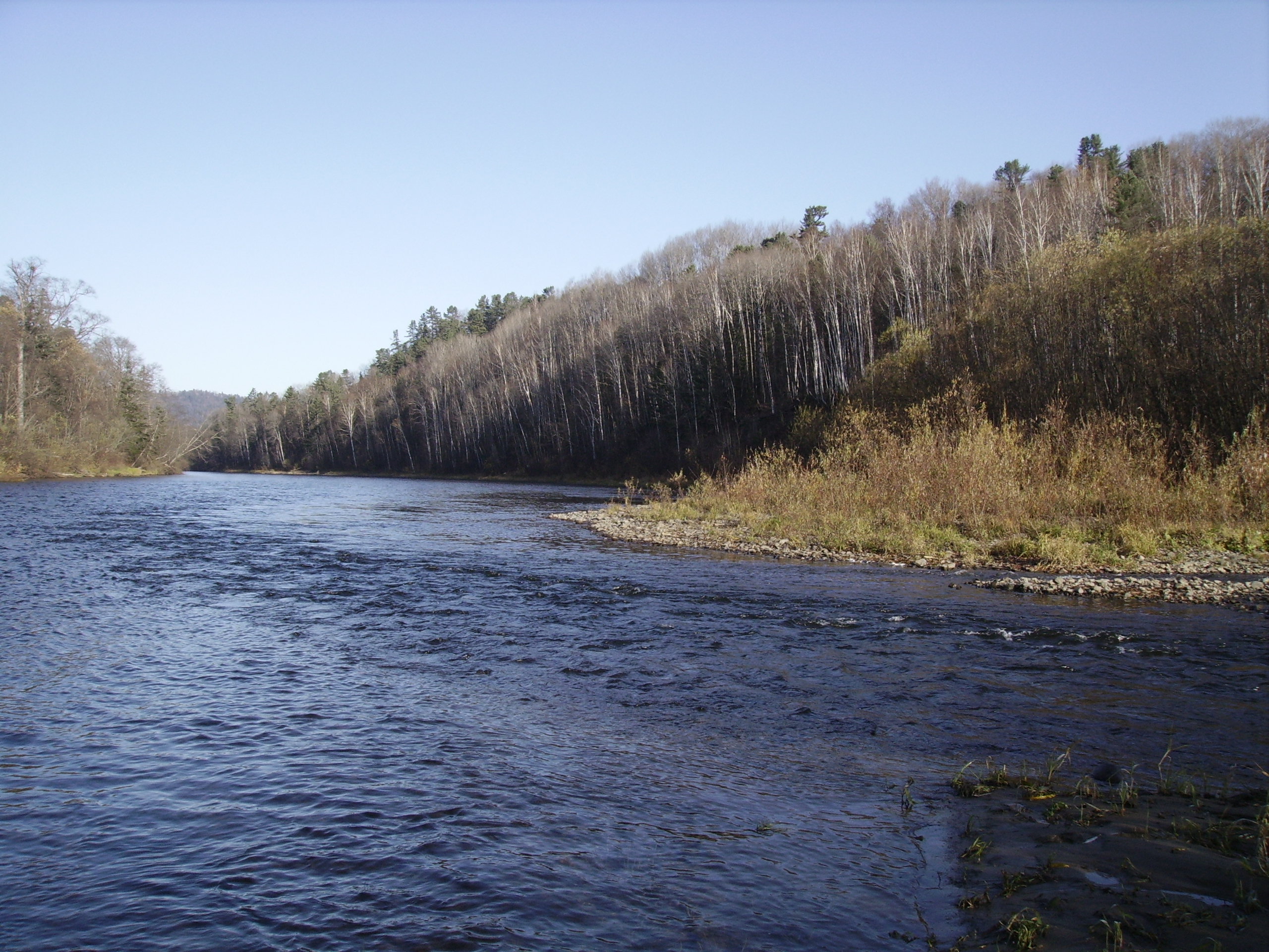 Река Хор у села Бичевая